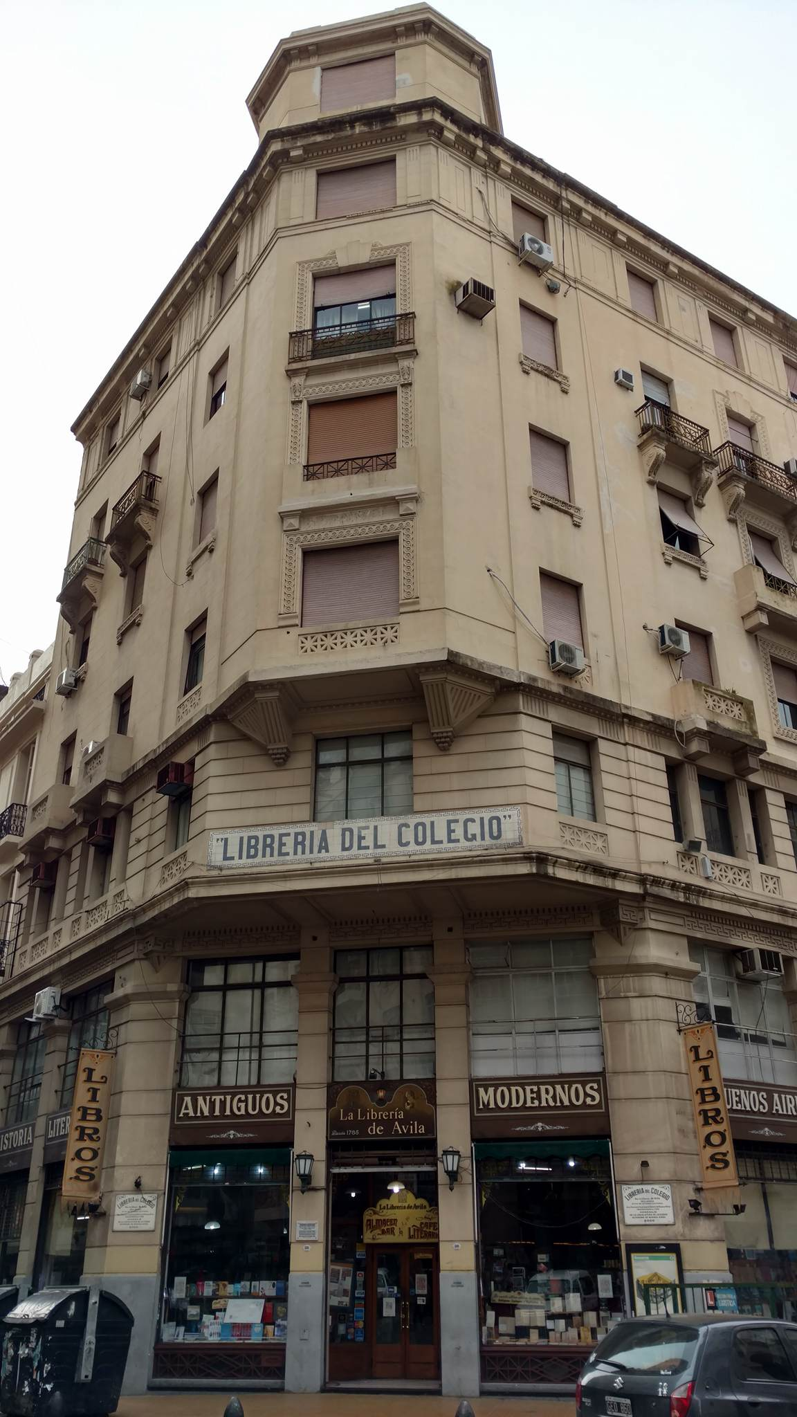 Exterior de la libreria del colegio en San Telmo